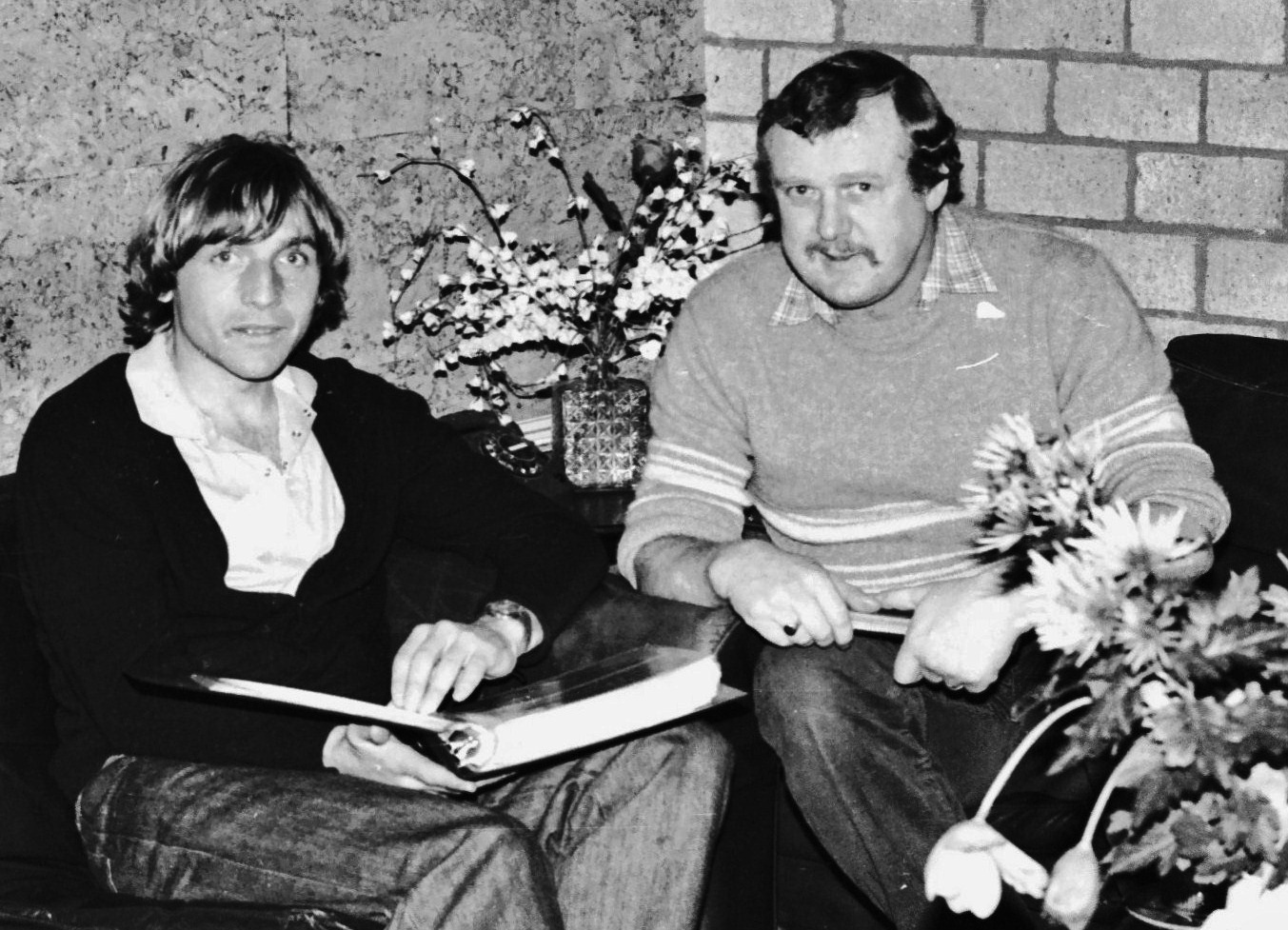 Kristen Nygaard op bezoek bij Thijs Ruiter in januari 1982. Nygaard zou AZ gaan verlaten, maar voordat dit zou gebeuren bracht hij een bezoek aan verzamelaar Thijs Ruiter om zijn AZ-carrière nog eens te bekijken in de fotoboeken.